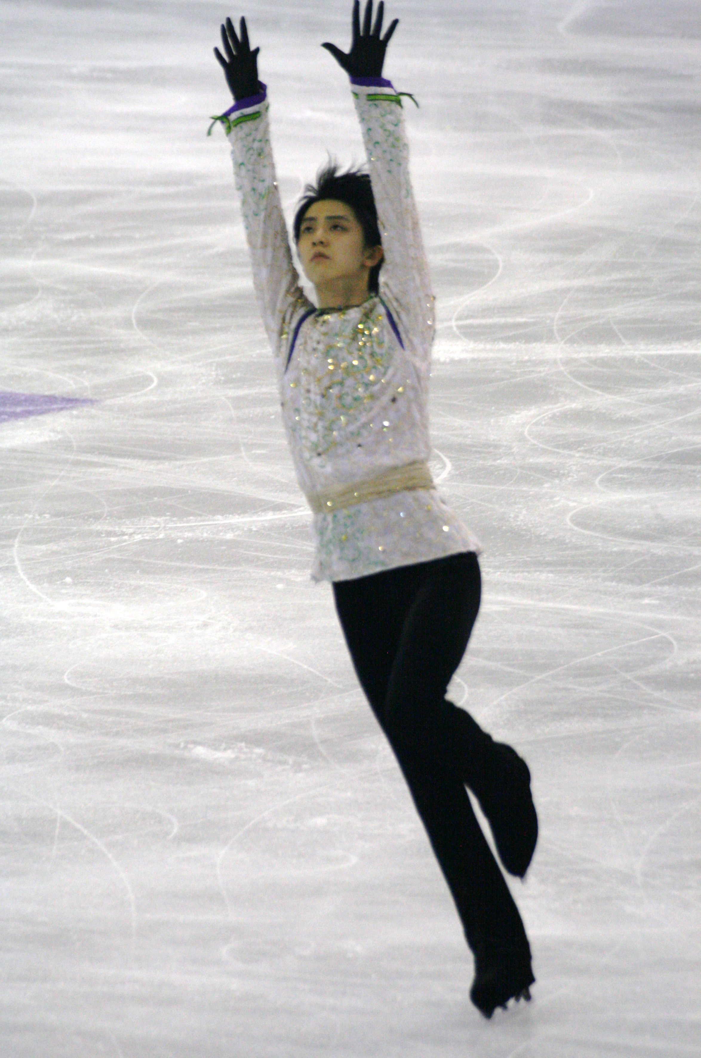 Юдзуру Ханью (Япония) на финале Гран-при по фигурному катанию 2015-2016.